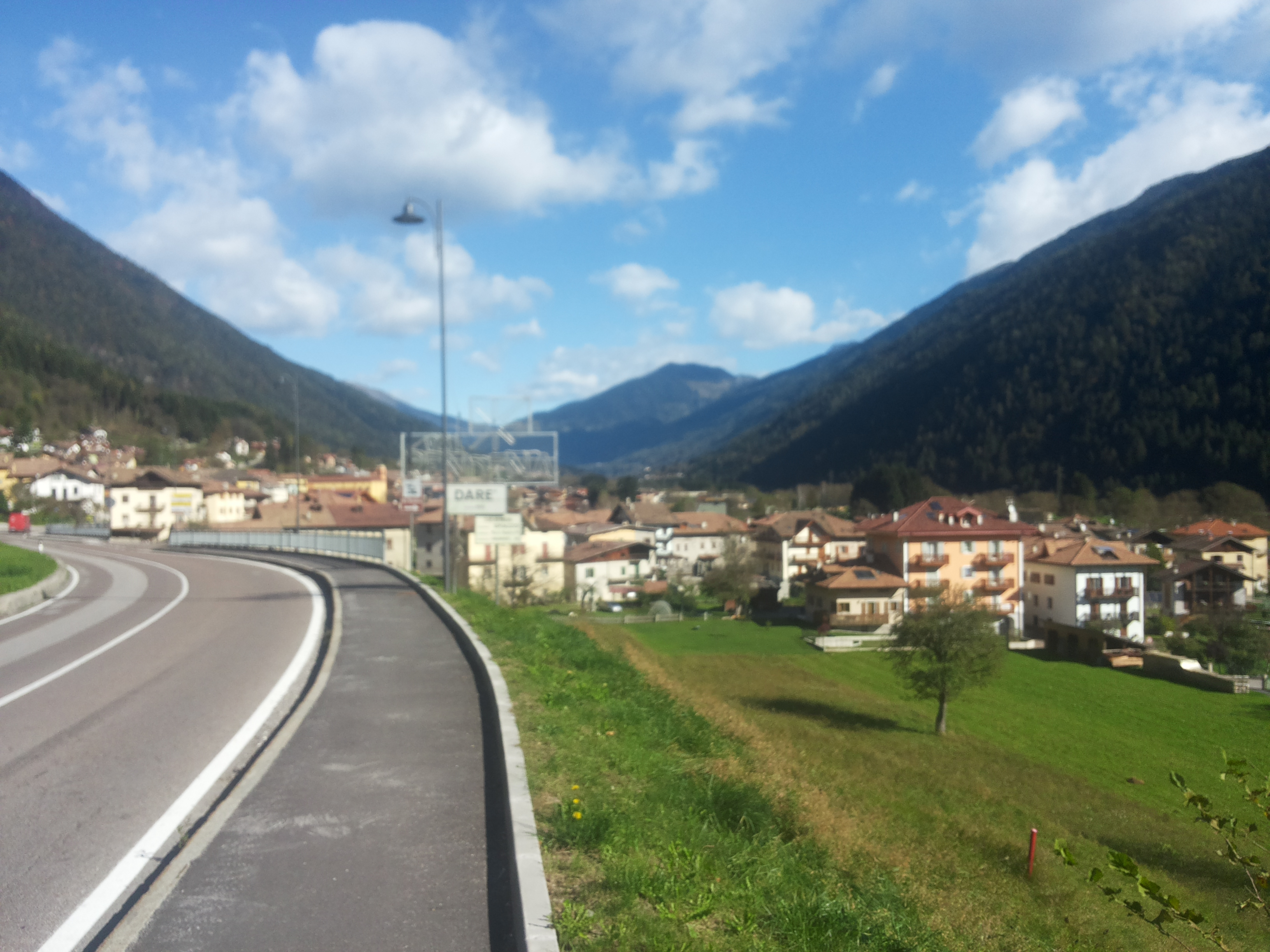 Darè in Val Rendena (provincia di Trento)